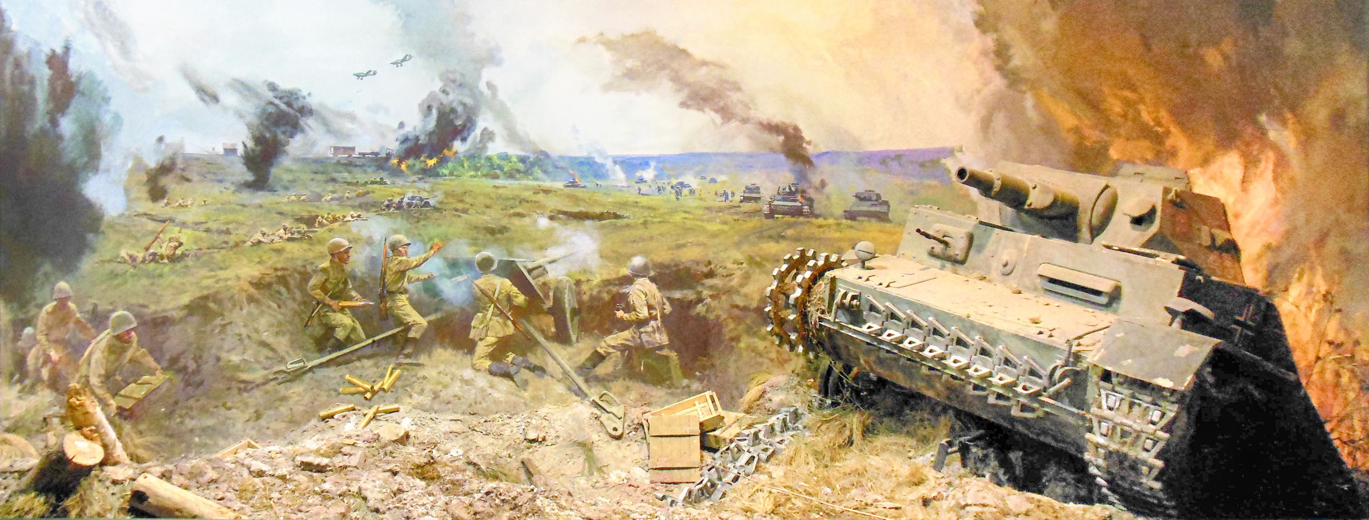 Беларуская (тарашкевіца): Экспазыцыя Магілеўскага абласнога краязнаўчага музэя